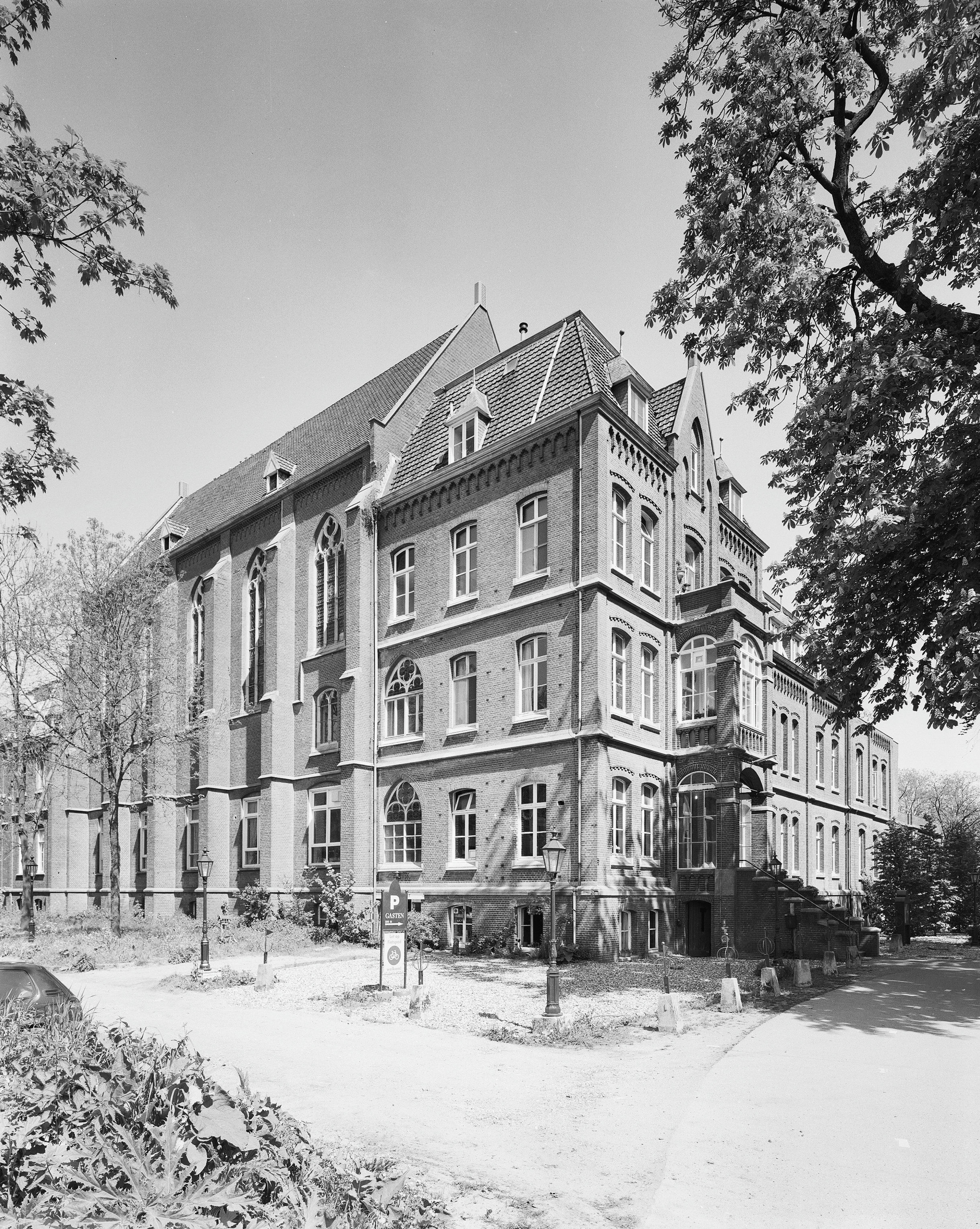 Maria Roepaan: Overzicht voorgevel en linker zijgevel en zijgevel kapel (opmerking: Gefotografeerd voor Monumenten In Nederland Limburg, bladzijde 287)